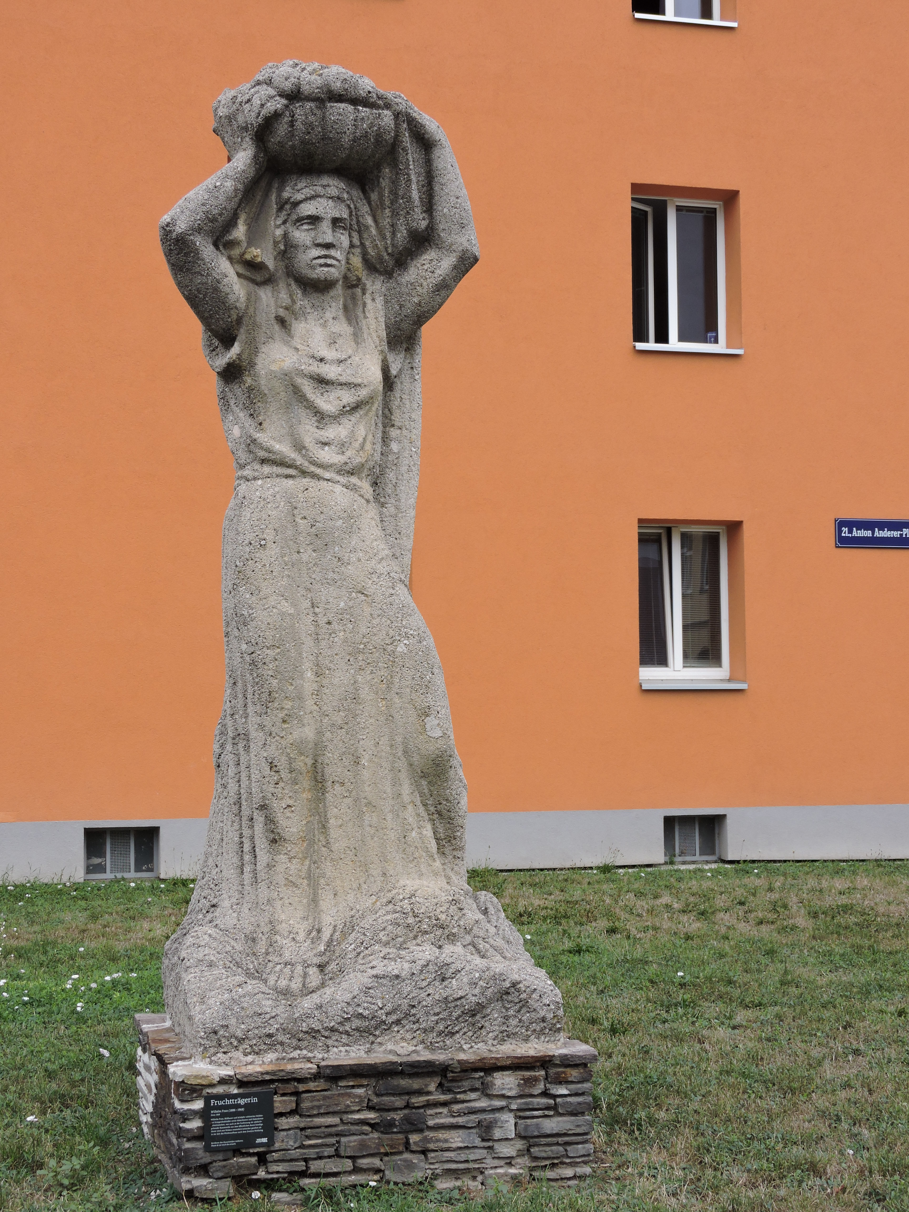 Plastik „Fruchtträgerin“ - Gemeindebau Anton Anderer Platz